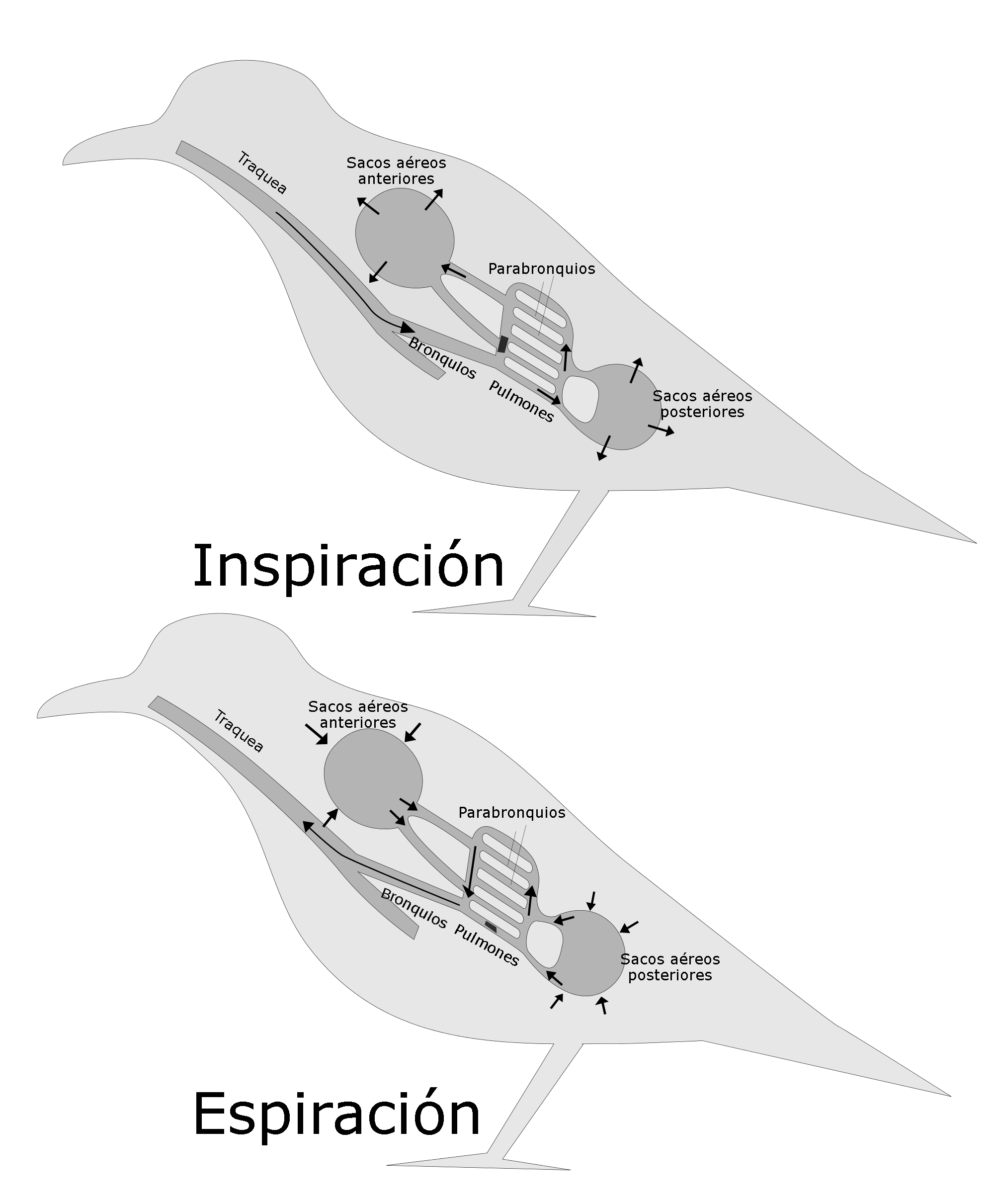 Esquema del aparato respiratorio de las aves en el que pueden observarse los sacos aéreos.